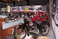 Allestimenti della mostra Moto bolognesi del Dopoguerra (15 novembre 2008 - 17 maggio 2009)